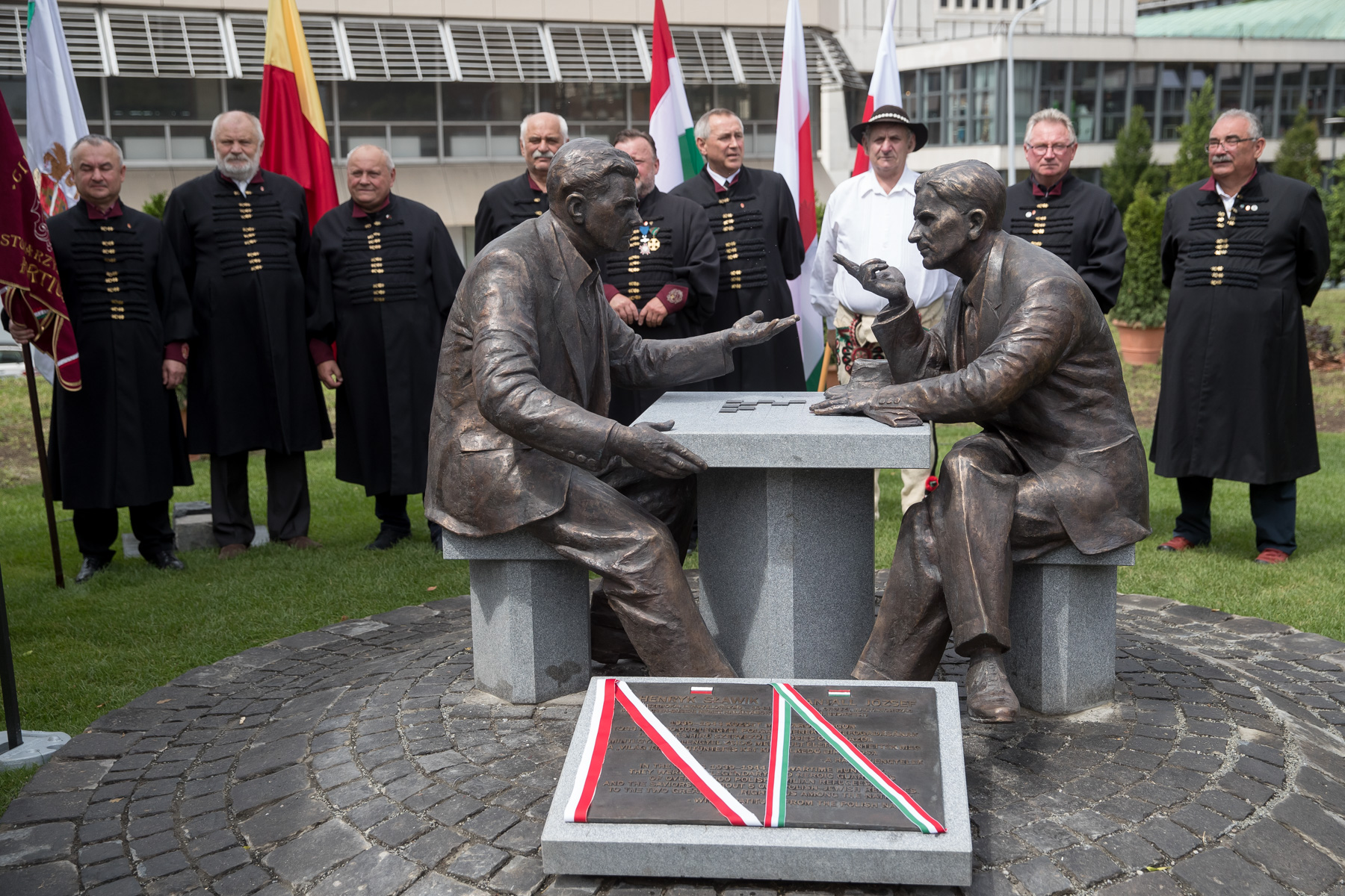 Odsłonięcie pomnika-ławeczki upamiętniającej Henryka Sławika i Józsefa Antalla w Budapeszcie